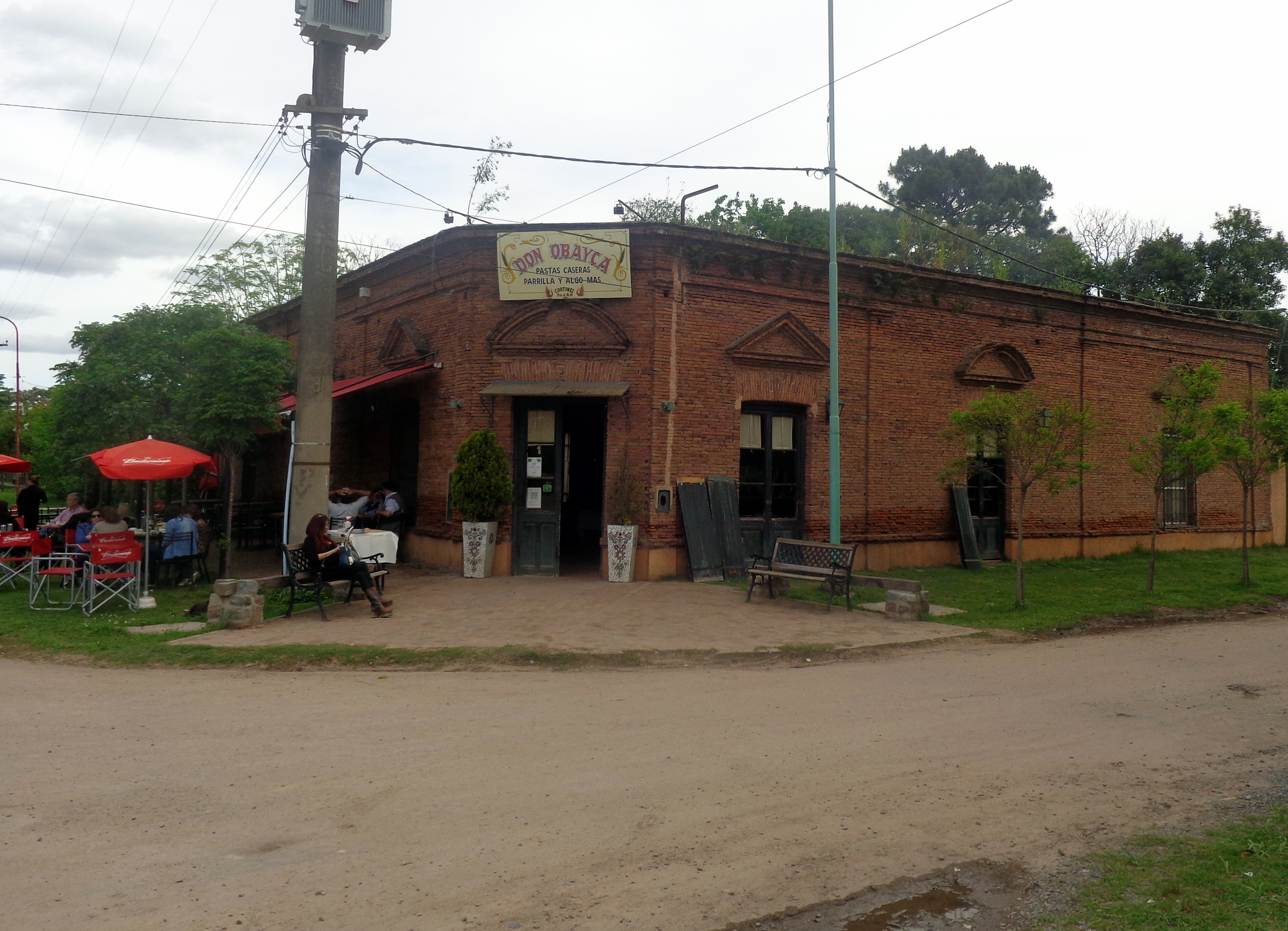 Cortines ubicada en el partido de Luján, provincia de Buenos Aires, Argentina.